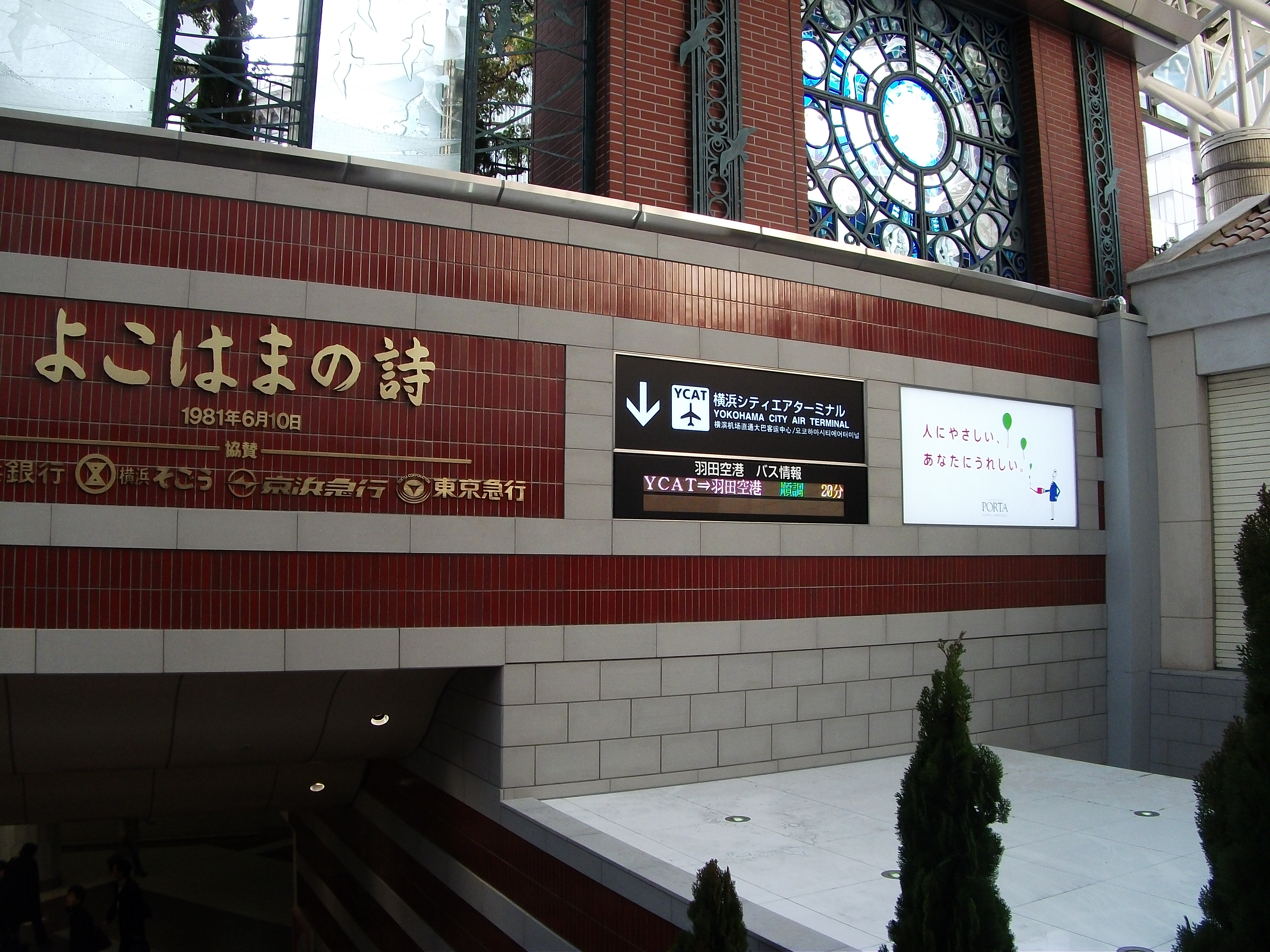 横浜ポルタ入口、羽田空港リムジンバスの所要時間を表示する電光掲示板